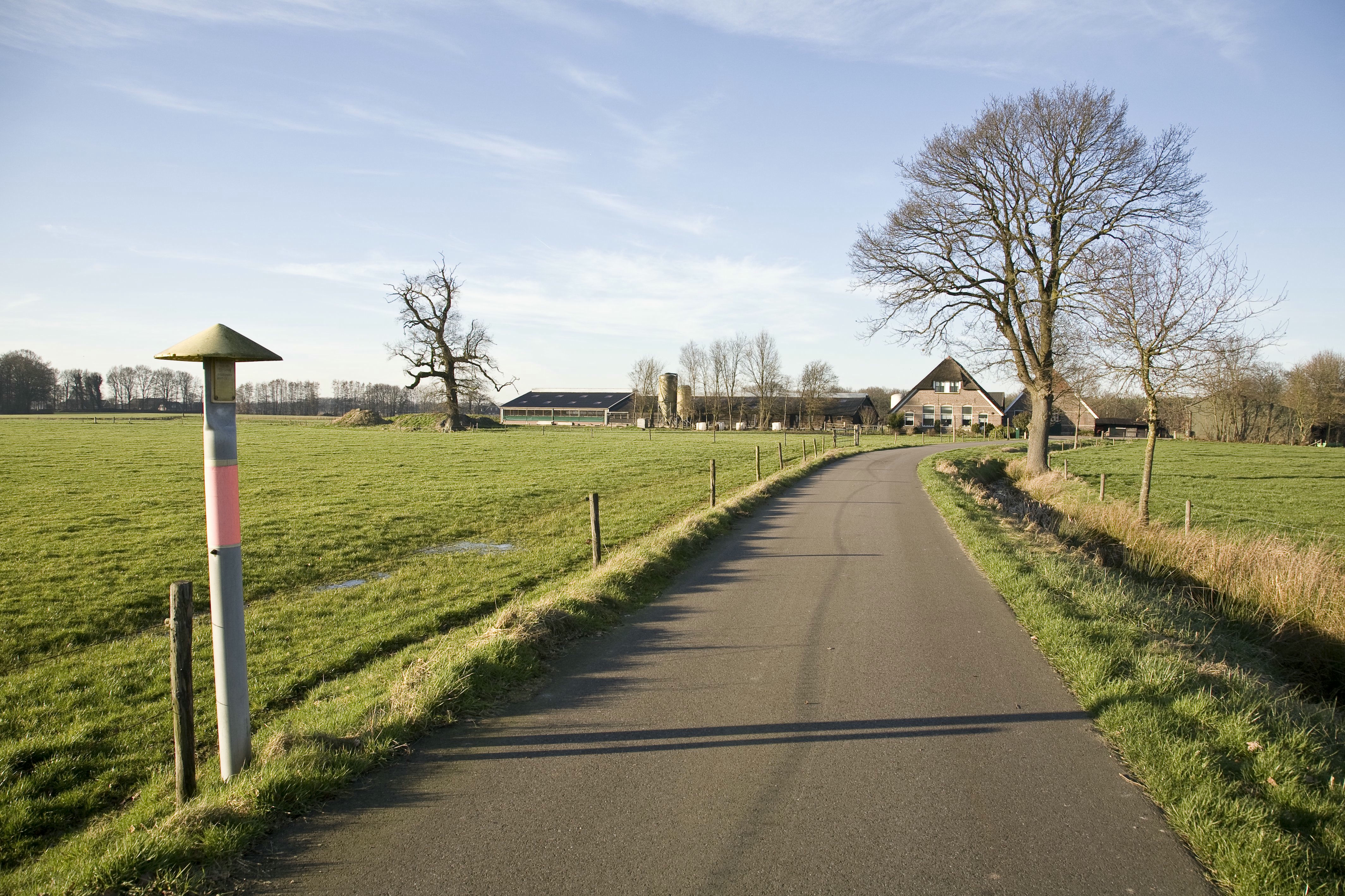 Erf Daggenvoorde: Overzicht op de weg. Sallands dekzandlandschap. Middeleeuwse erven in de omgeving van Colmschate (opmerking: Publicatie: Mens en land in het hart van Salland (Landschapsbiografie Oost-Nederland))